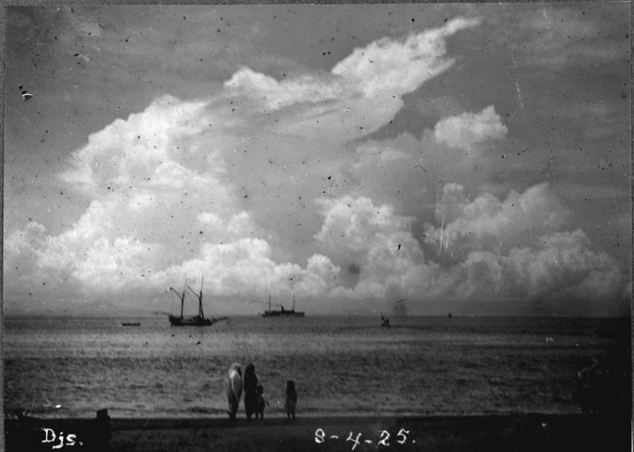 Foto. Herinnering aan het bezoek van Z.E. den Gouverneur Generaal Mr. D. Fock aan Lombok 6/8 April 1925. Haven Laboean Hadji Havengezicht op Labouan-Hadji